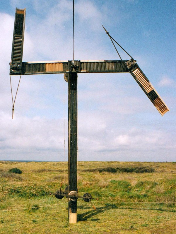 Eigen werk. Originele Chappe telegraaf die op de lijn Antwerpen Vlissingen dienst heeft gedaan. Deze telegraaf is in 1992 in het PTT Museum (v.a. 1999 Museum voor Communicatie) gerestaureerd. Foto: Peter Denters, 1992.